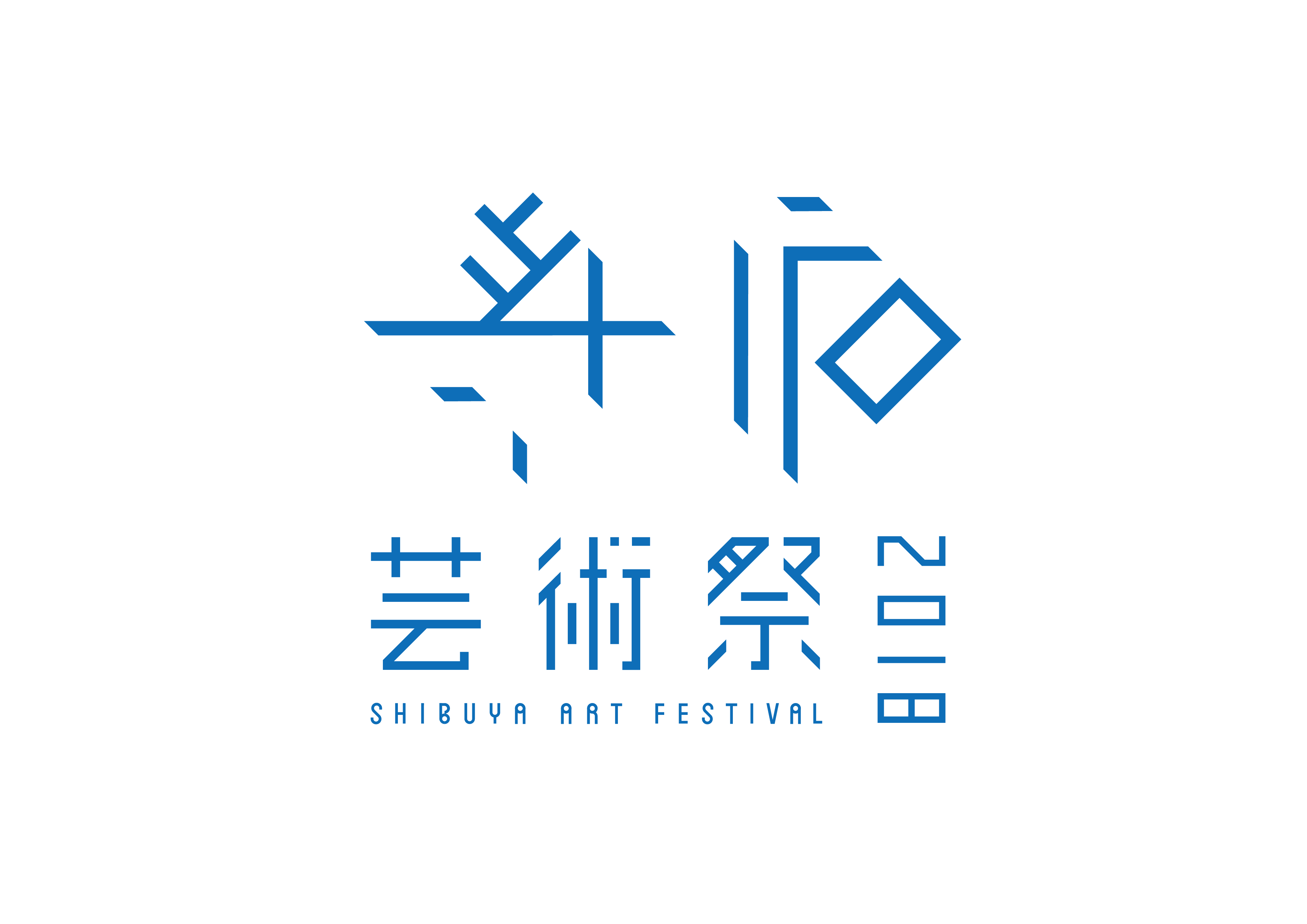 第１０回渋谷芸術祭 2018の公式ロゴです。渋谷芸術祭実行委員会主催、渋谷区共催、東京都後援。平成30年10月下旬から11月に開催します。